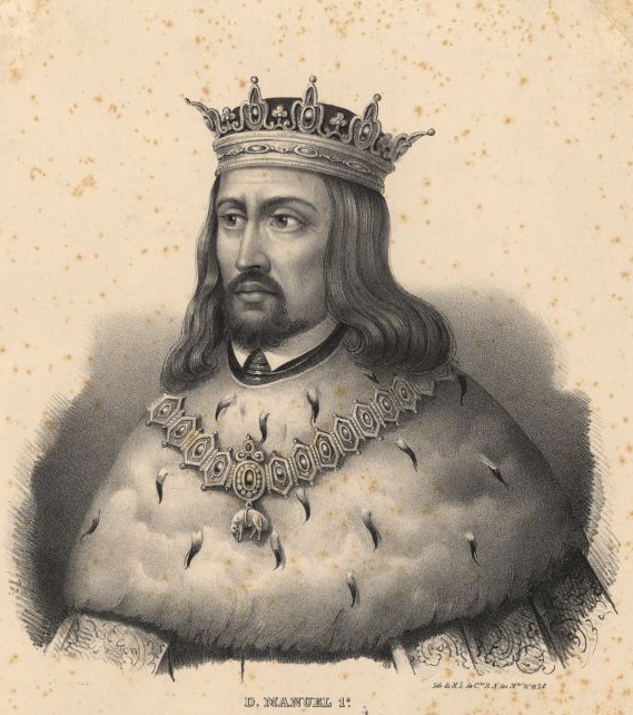 o rei Manuel I